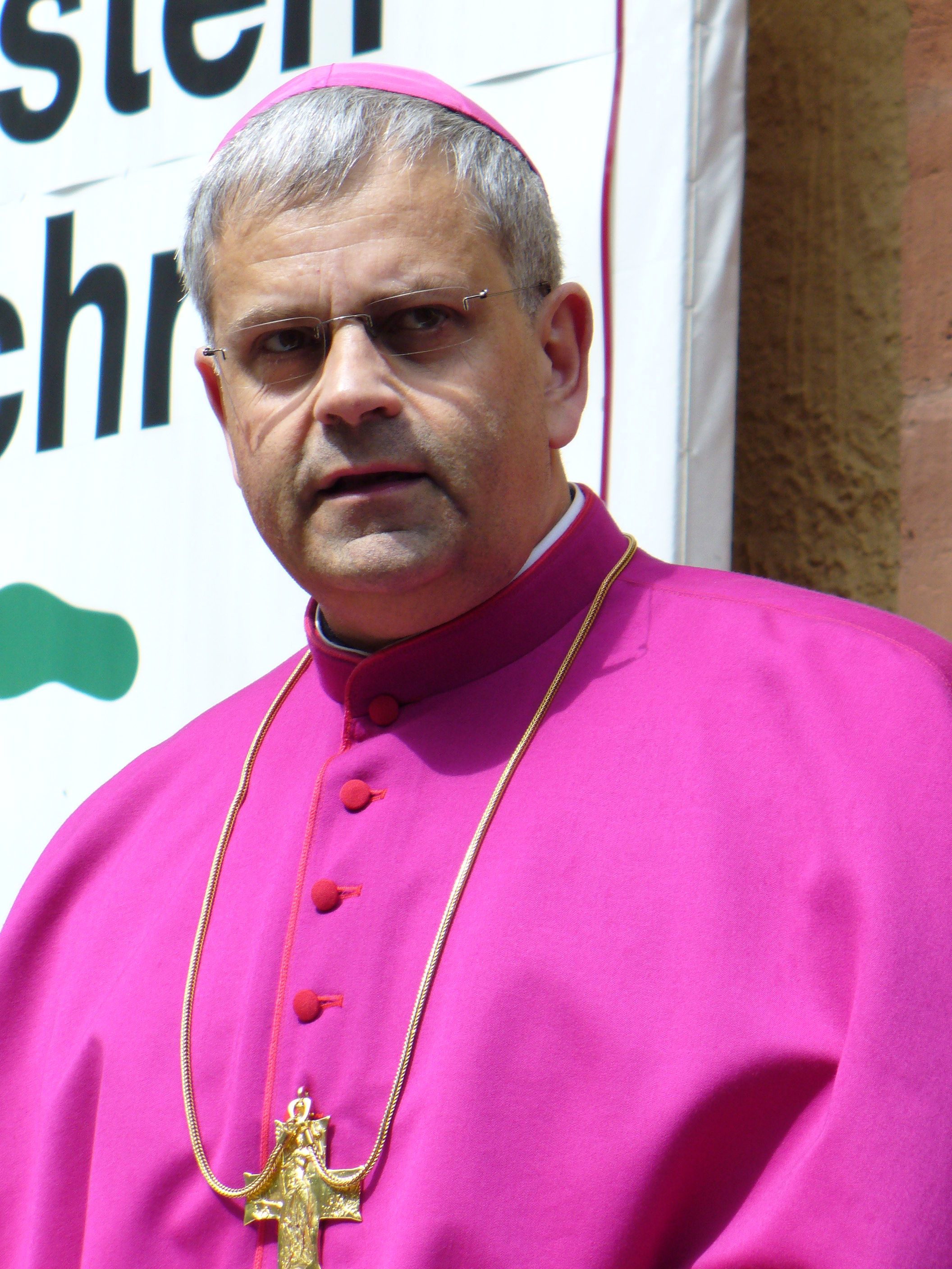 Weihbischof Reinhard Hauke bei der 51. Männerwallfahrt zum Klüschen HagisAuxiliary Bishop Reinhard Hauke at the Pilgrimage of Men to Klüschen Hagis